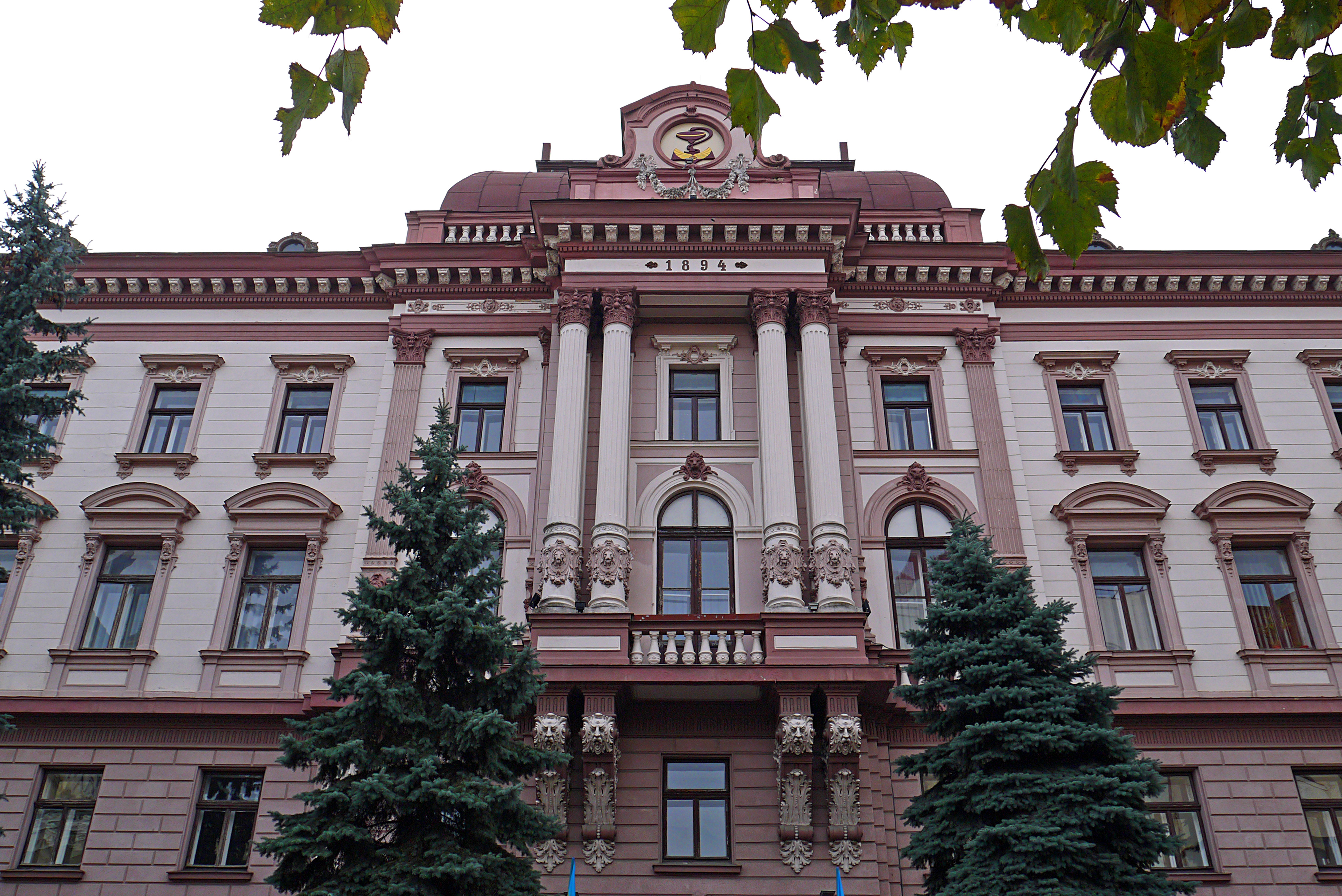 Австрійська дирекція залізниці, пізніше польський магістрат (мур.), Івано-Франківськ, вул. Галицька, 2